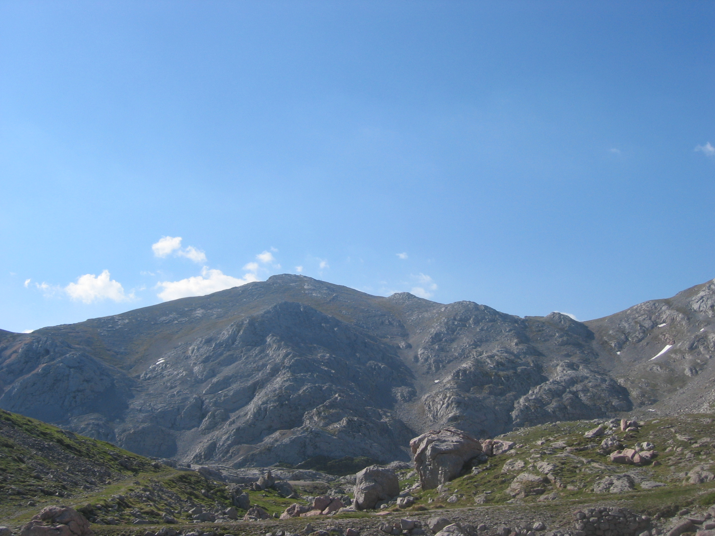 El Pico Sagrado Corazón es una de las cumbres del Macizo de Ándara, en los Picos de Europa (Cantabria, España).